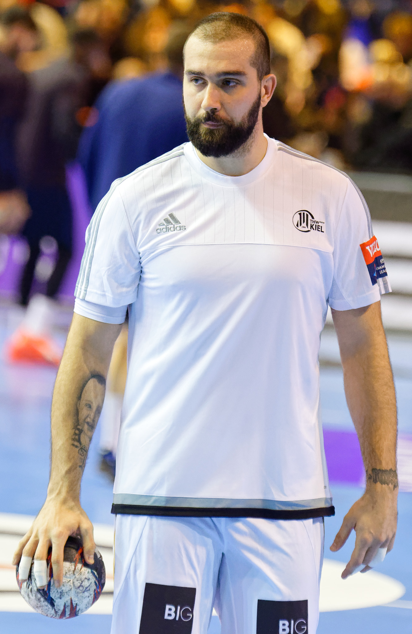 Rencontre de phase de groupe de ligue des champions 2015-16 entre le PSG et le THW Kiel. A la Halle Carpentier (Paris), le 22 novembre 2015.